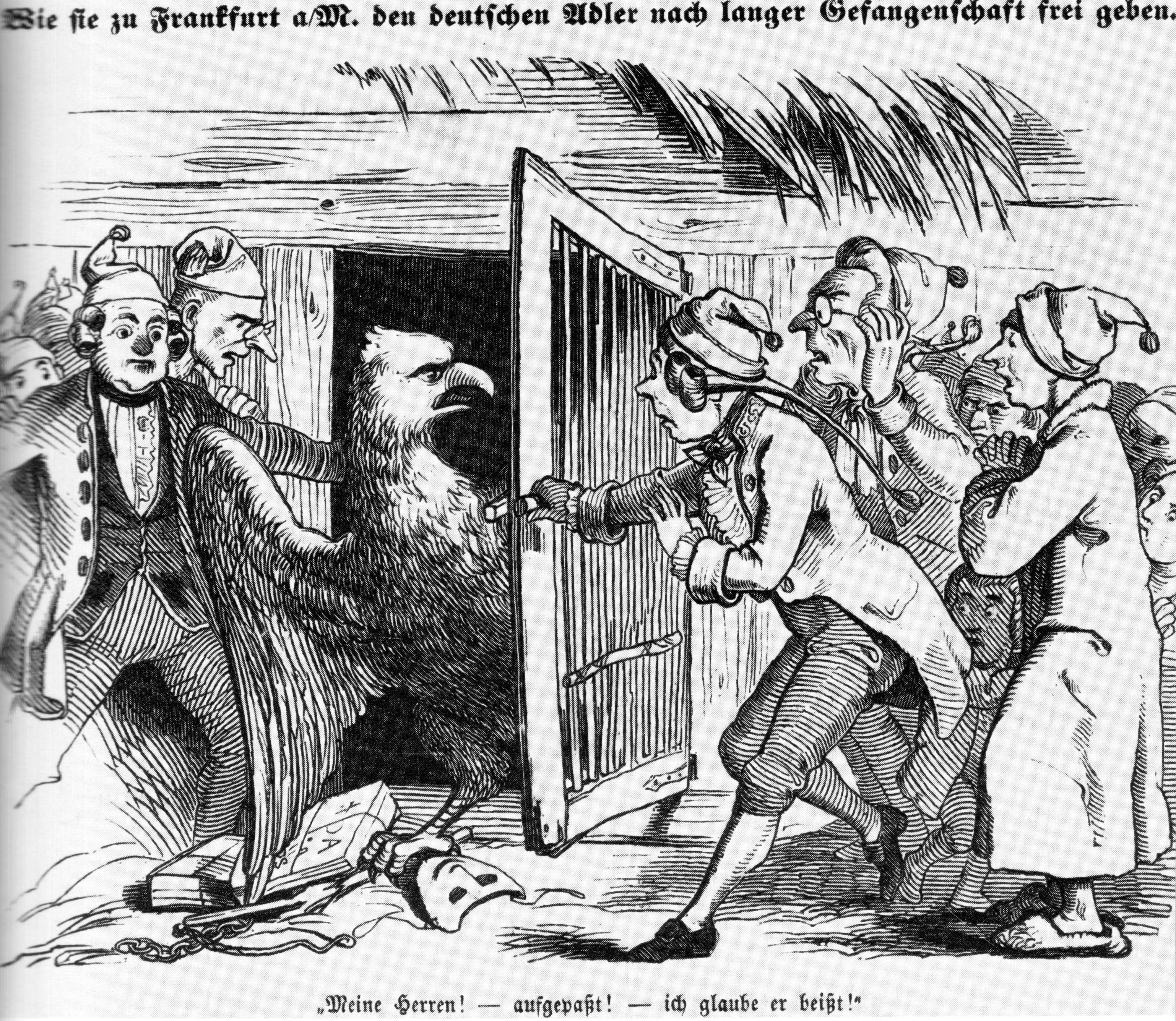 Bund lässt Adler los. 1848.